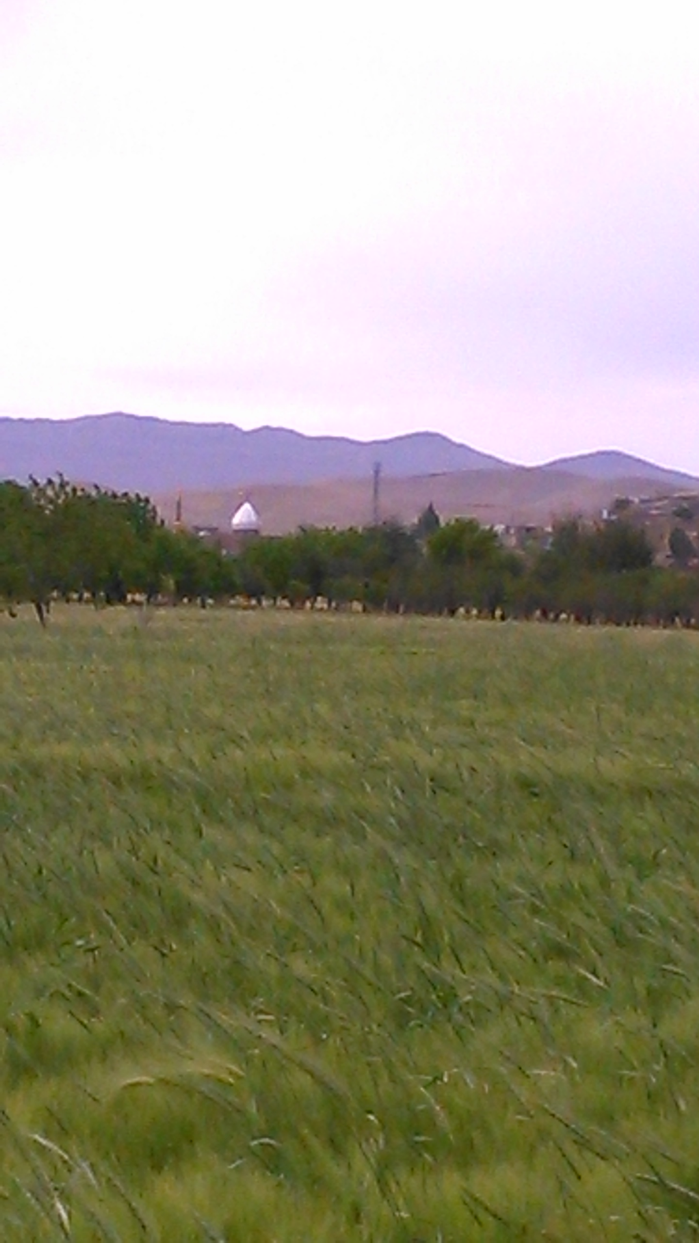 آغچه مسجد